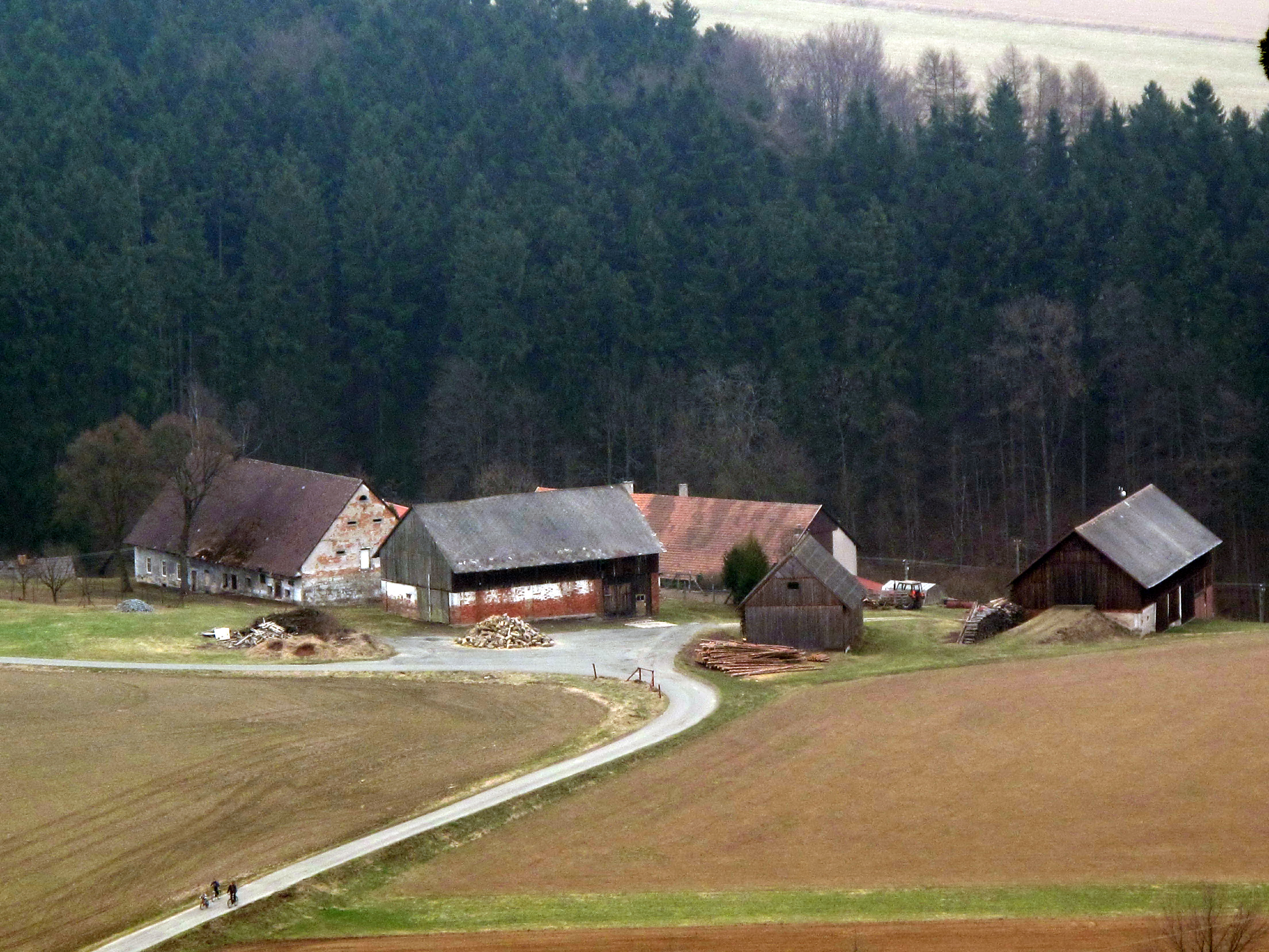 Česky: Police nad Metují-Pěkov, okres Náchod. Výhled z Kočičích skal na č. p. 3.